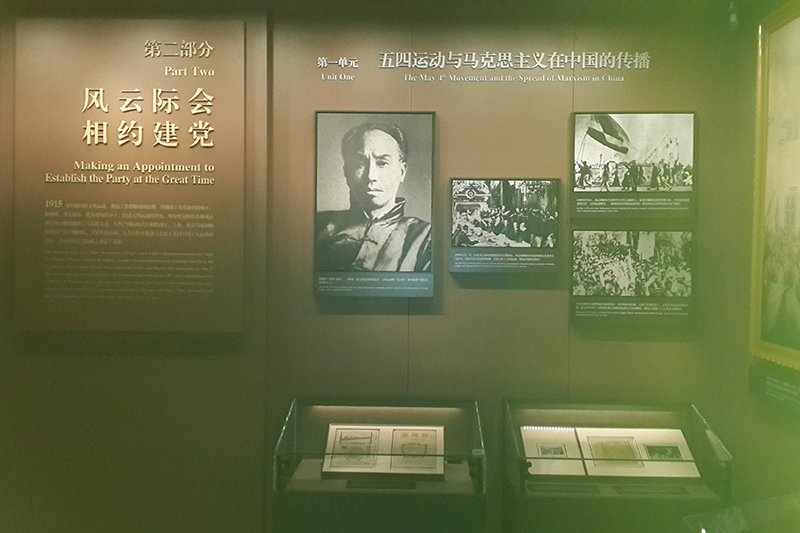 l’émergence en temps de crise-la fondation du parti